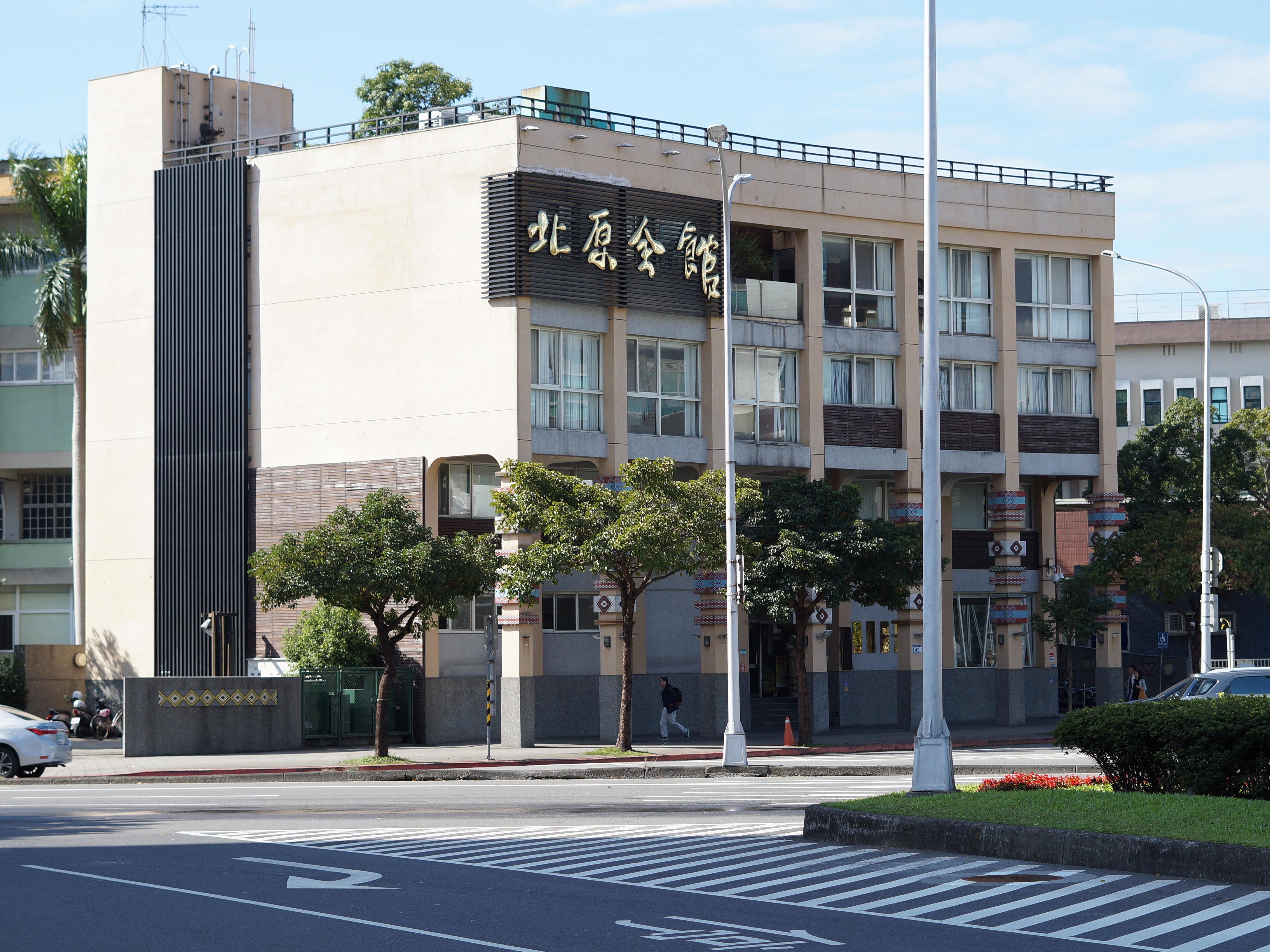 臺北市政府原住民族事務委員會北原會館，位於臺北市政府警察局南港分局第一代大樓，2010年6月19日落成揭幕，地址：臺北市南港區向陽路49號。